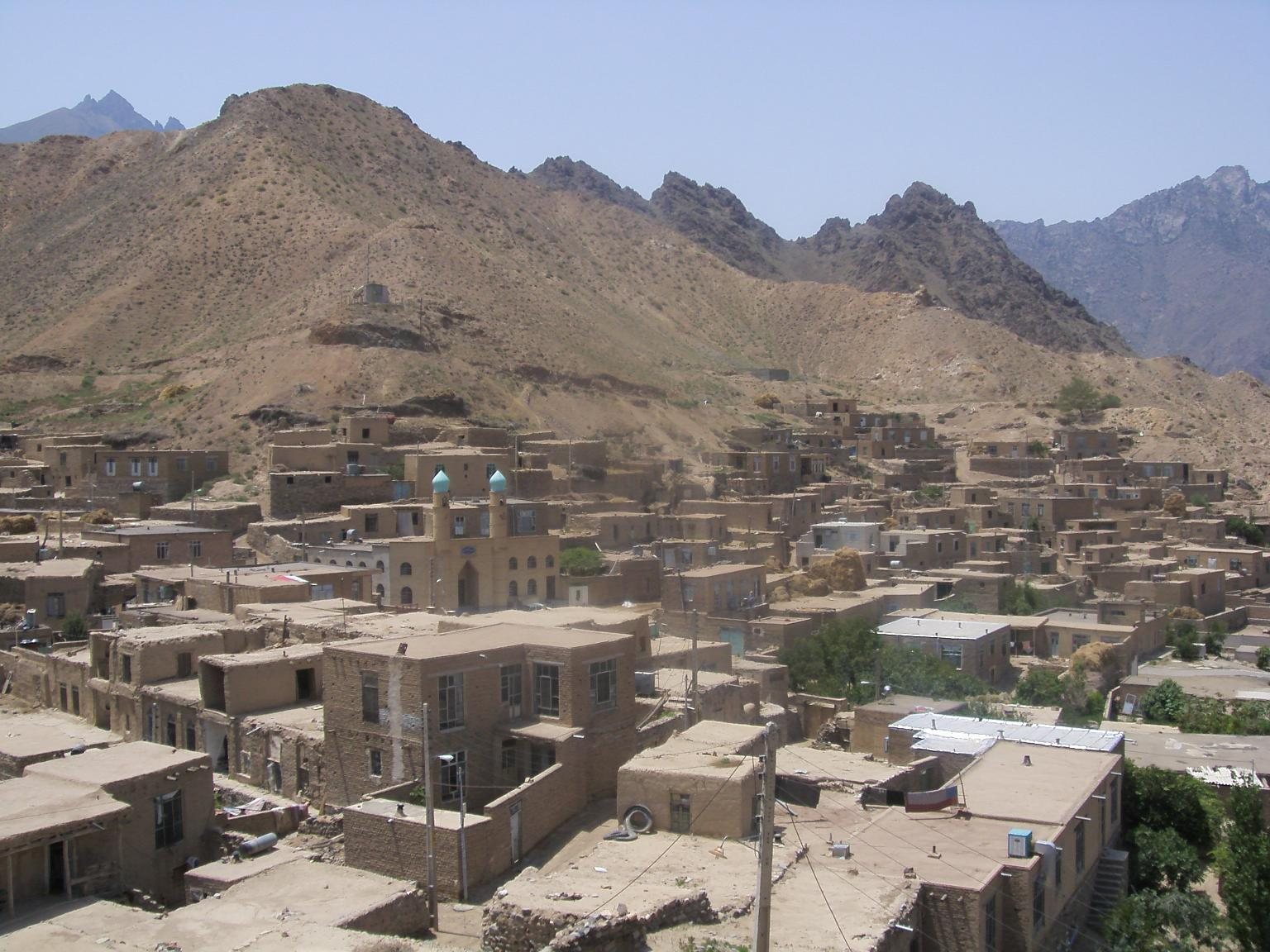 Douzal village, Jolfa, Iran